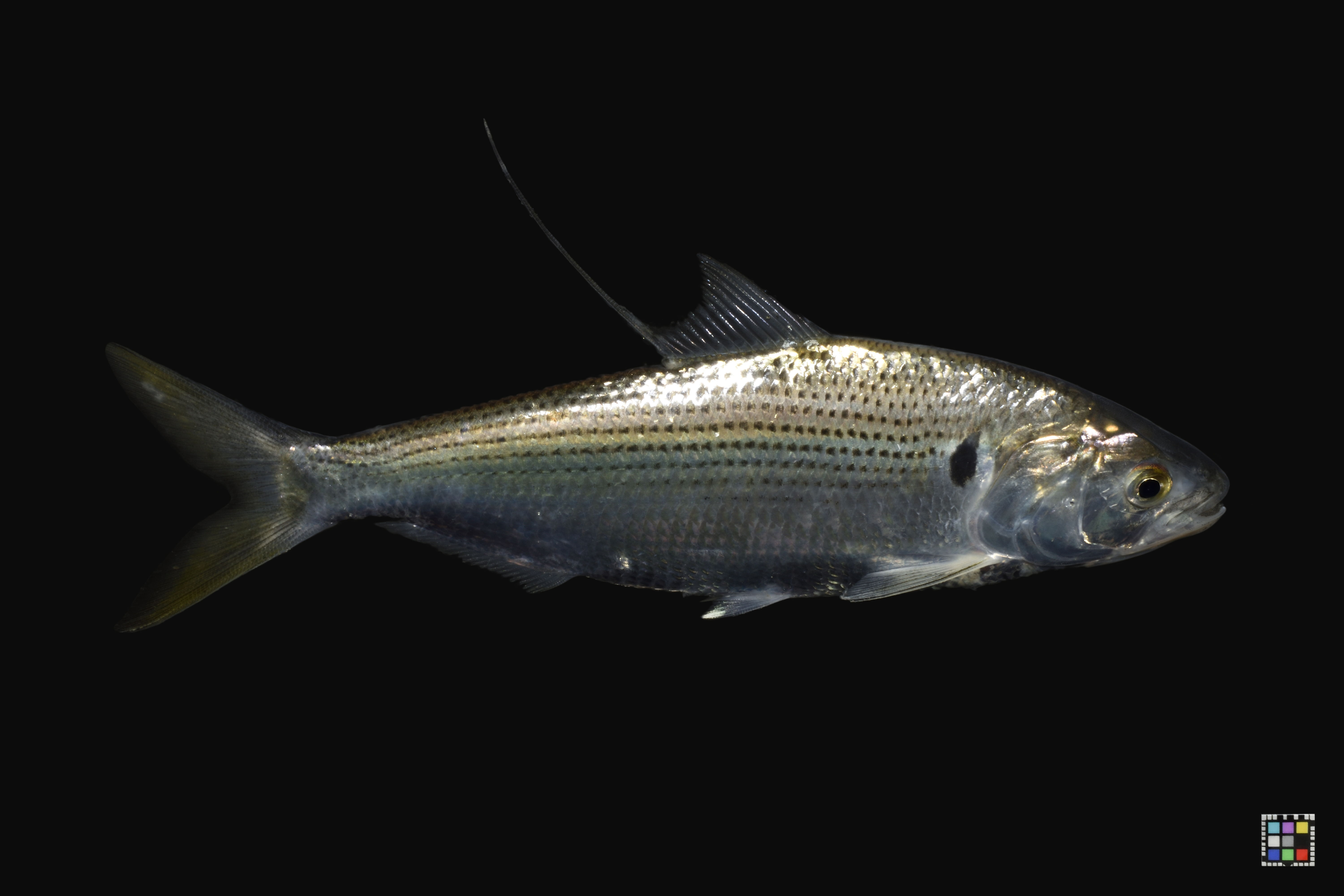 コノシロ。熊本県 八代海。詳細